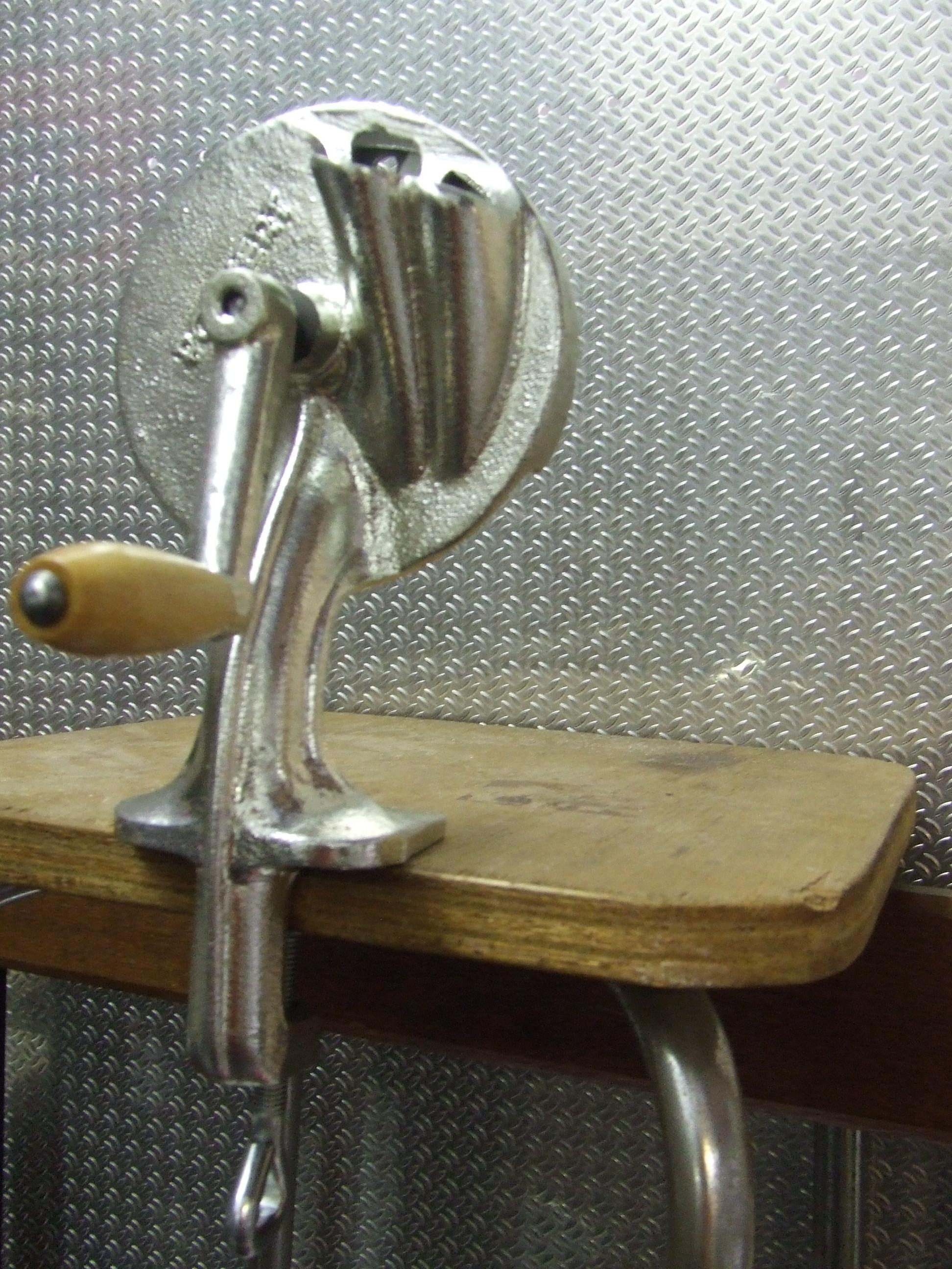 Bonenmolen